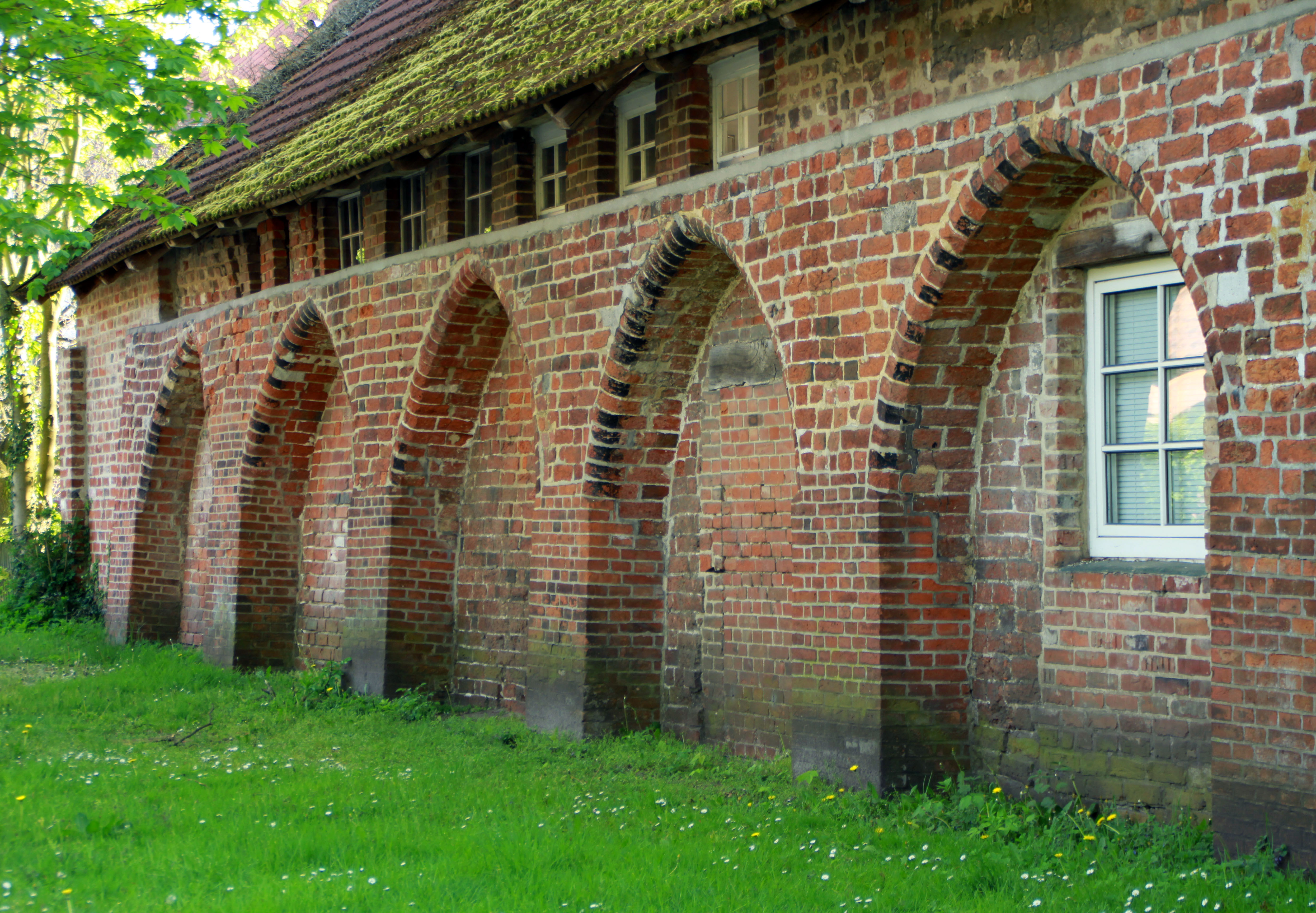 Seitenansicht des Kreuzgangrestes des ehemaligen Klosters in Scharnebeck.